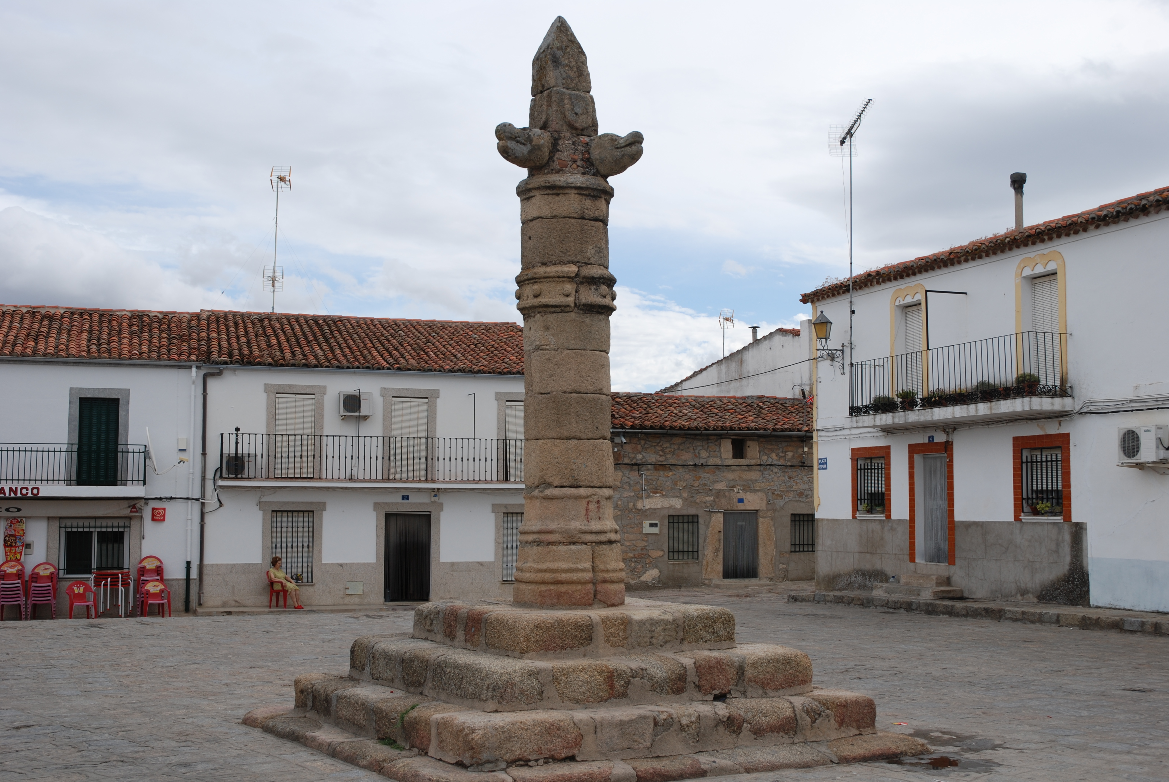 Rollo de Belvís de Monroy (Cáceres)